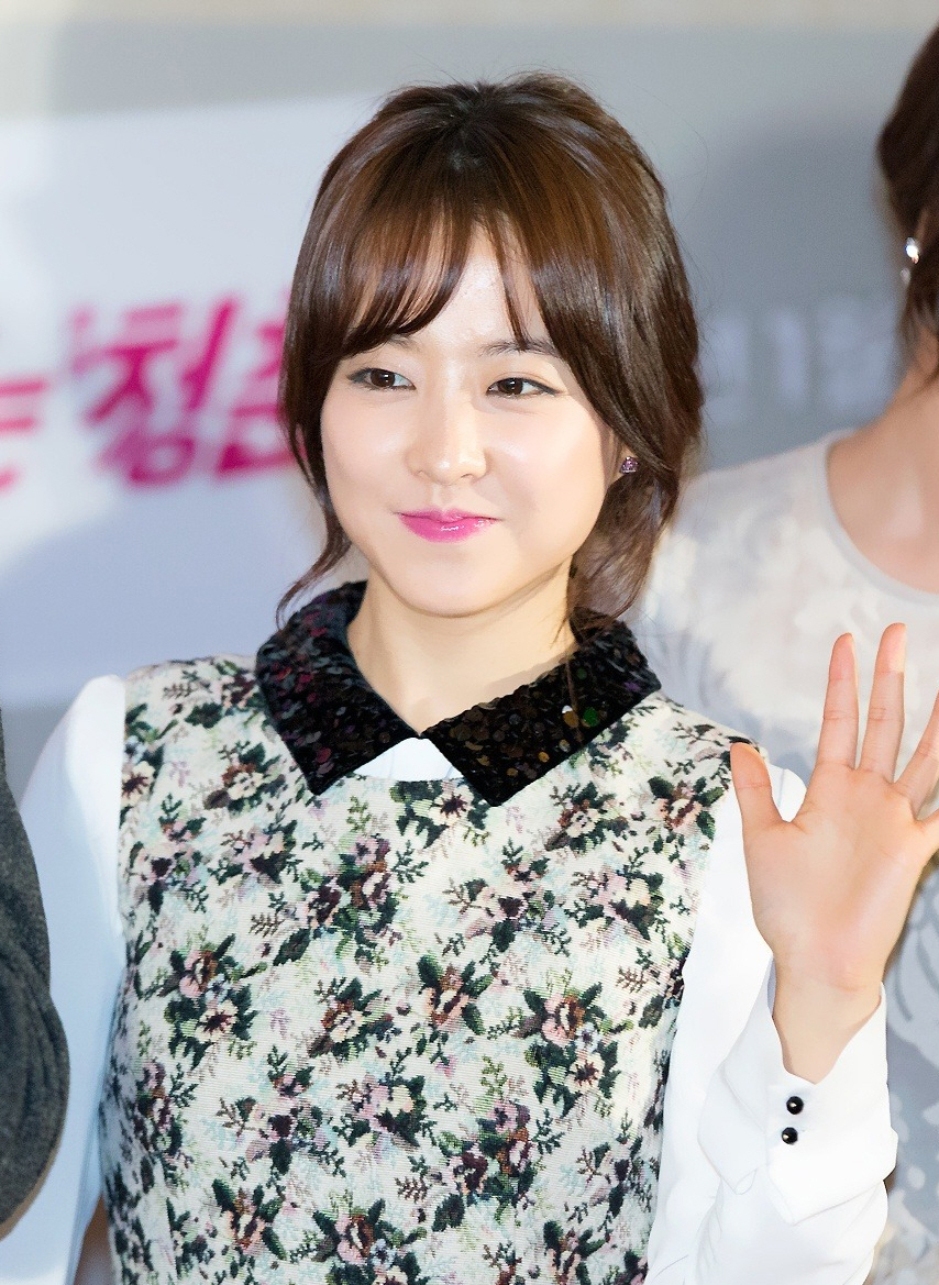 140120-피-끓는-청춘-vip시사회박보영